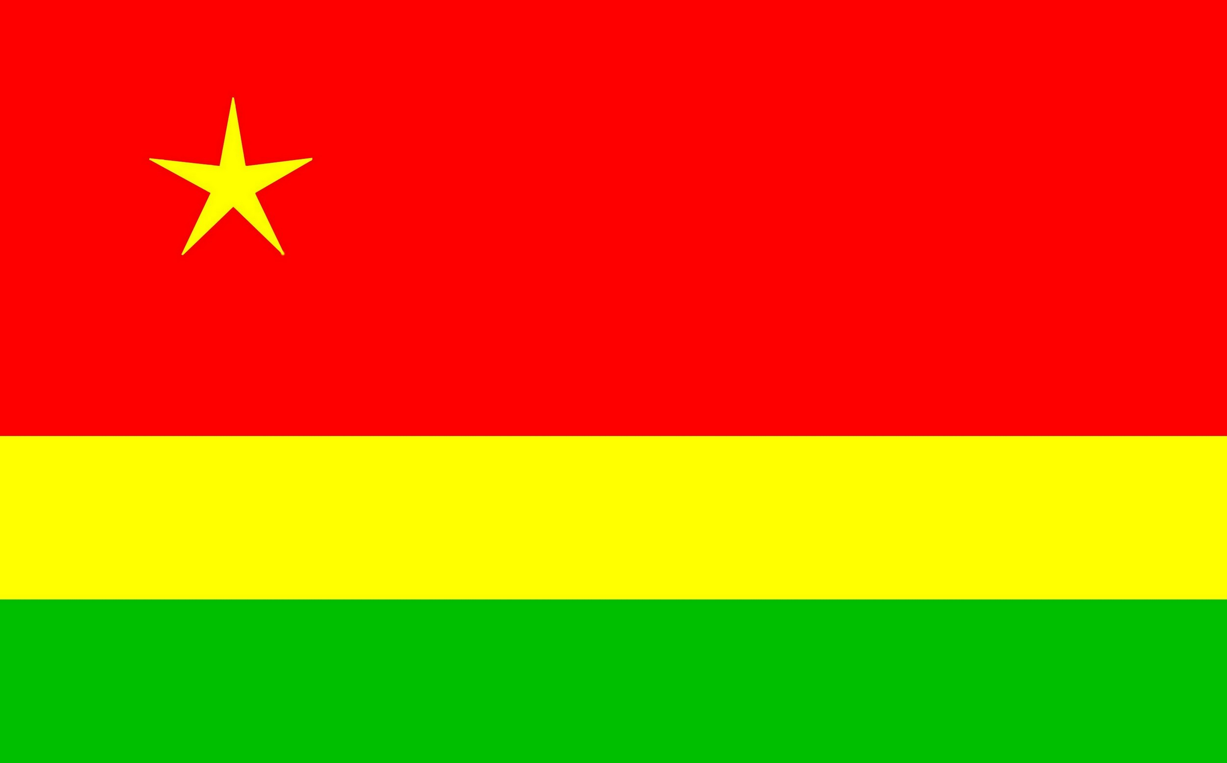 Drapeau nationaliste réunionnais